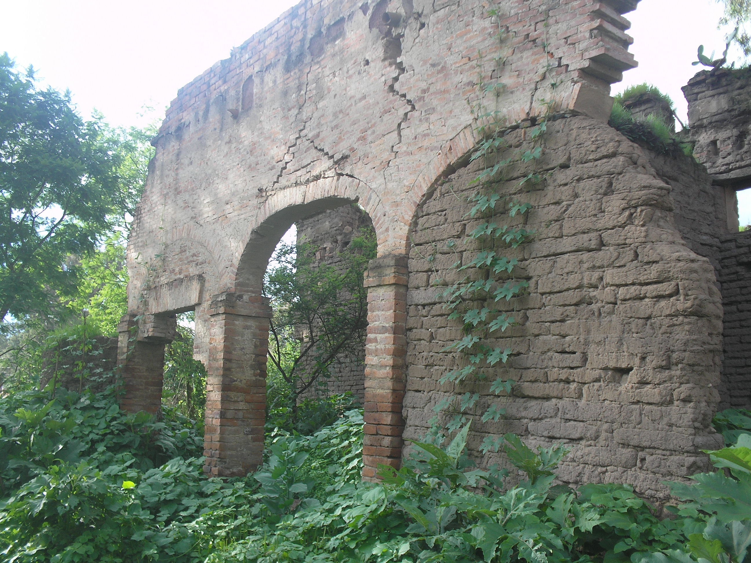 Fotografía propia.